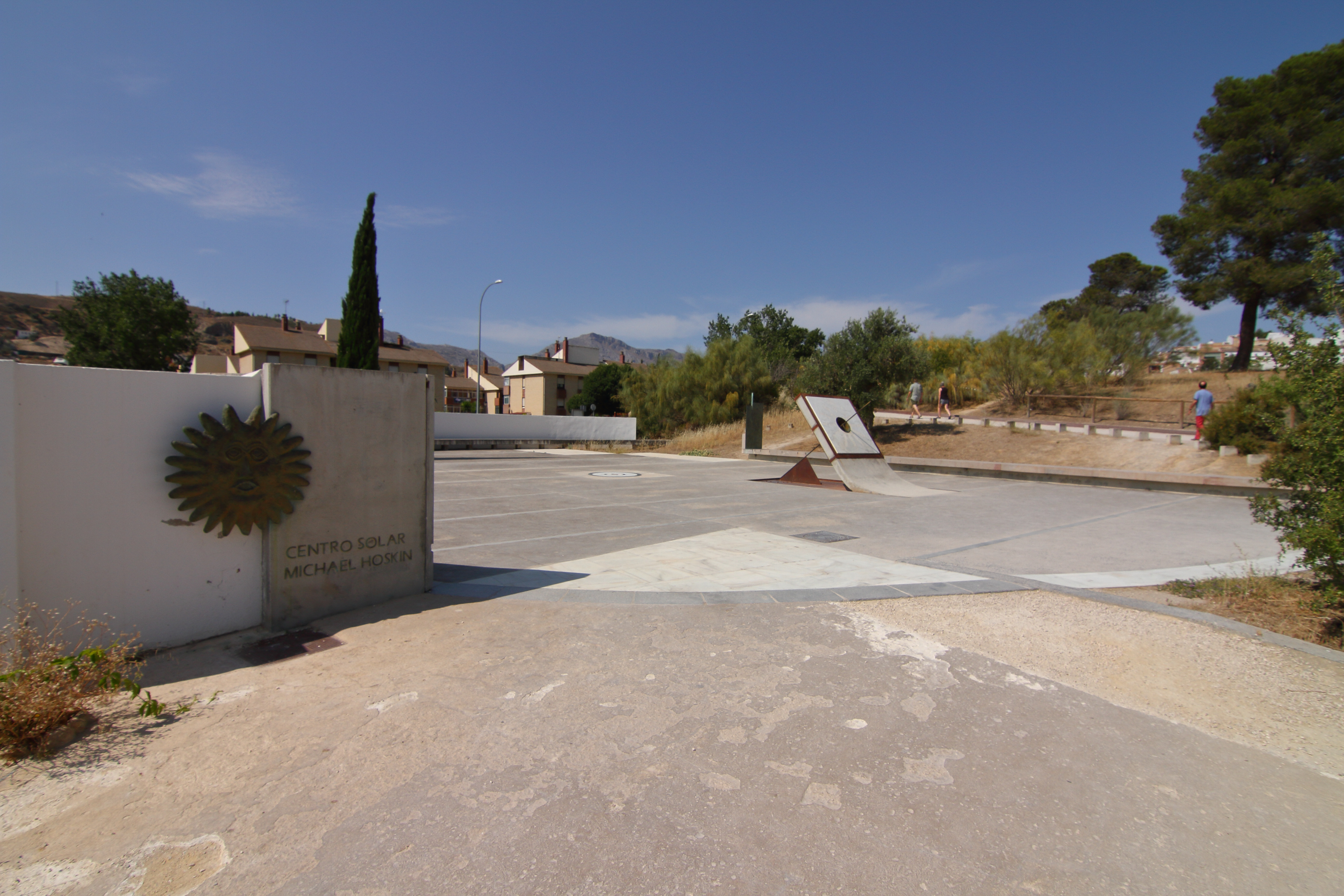 Centro solar Michael Hoskin en el sitio de los domenes de Antequera